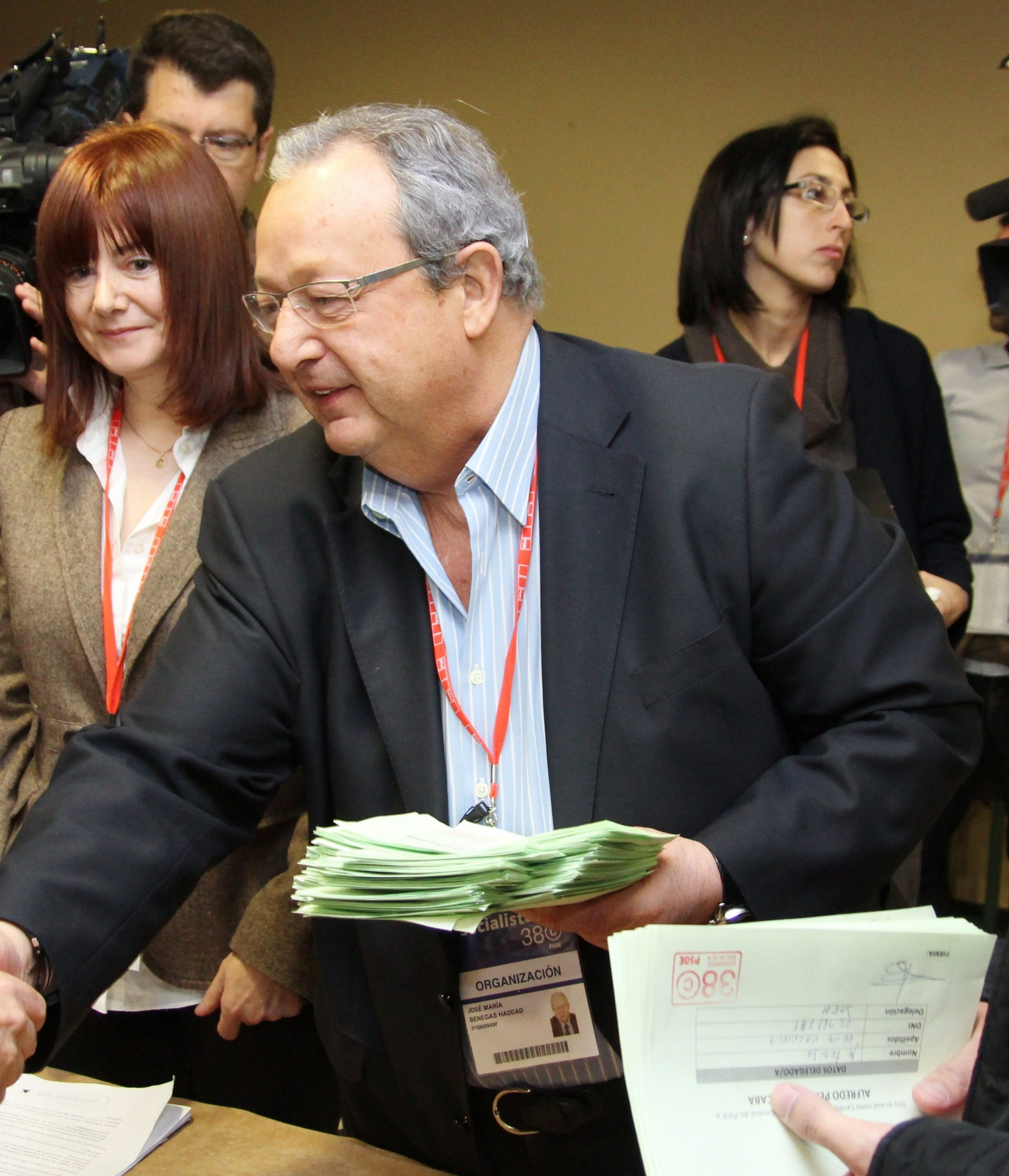 Txiki Benegas entrega los avales necesarios para que Alfredo Pérez Rubalcaba sea candidato a la secretaría general del PSOE en el 38 Congreso del partido